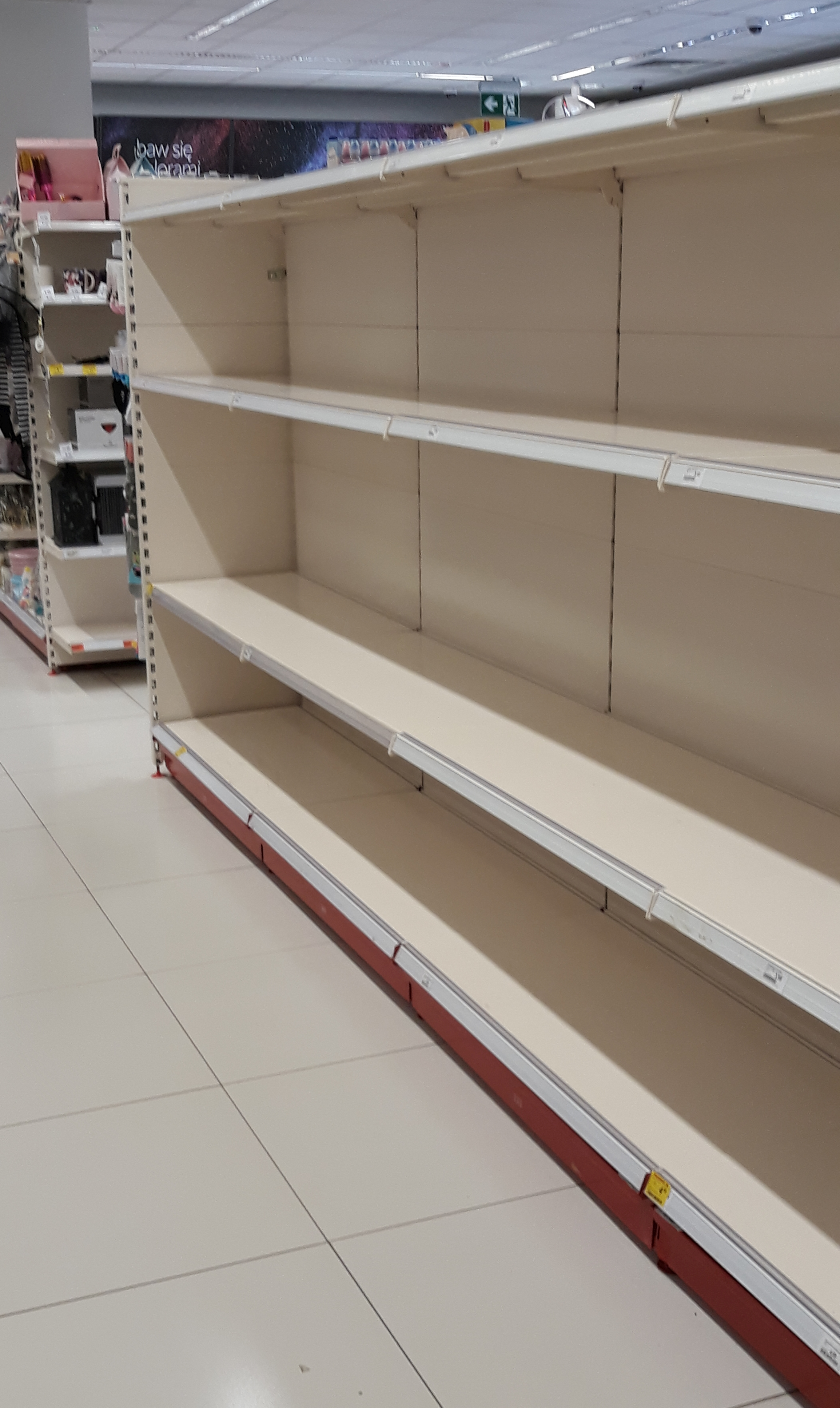 Puste półki po papierze toaletowym jako wynik masowego wykupywania związanego z lękiem przed pandemią COVID-19. Jedna z drogerii Rossmanna w Warszawie